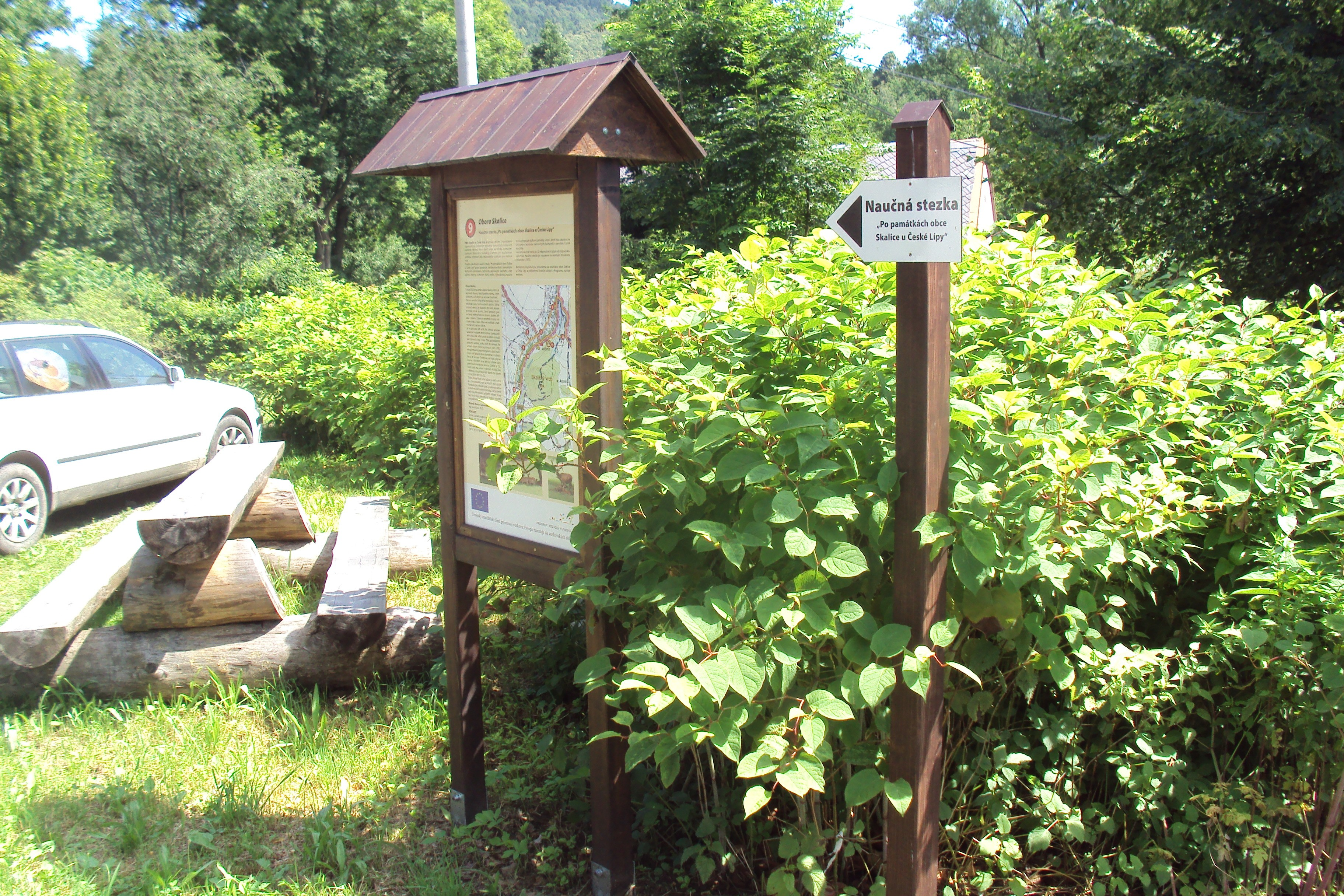 Naučná stezka Skalicí, zastavení deváté, popisovaná obora je jinde